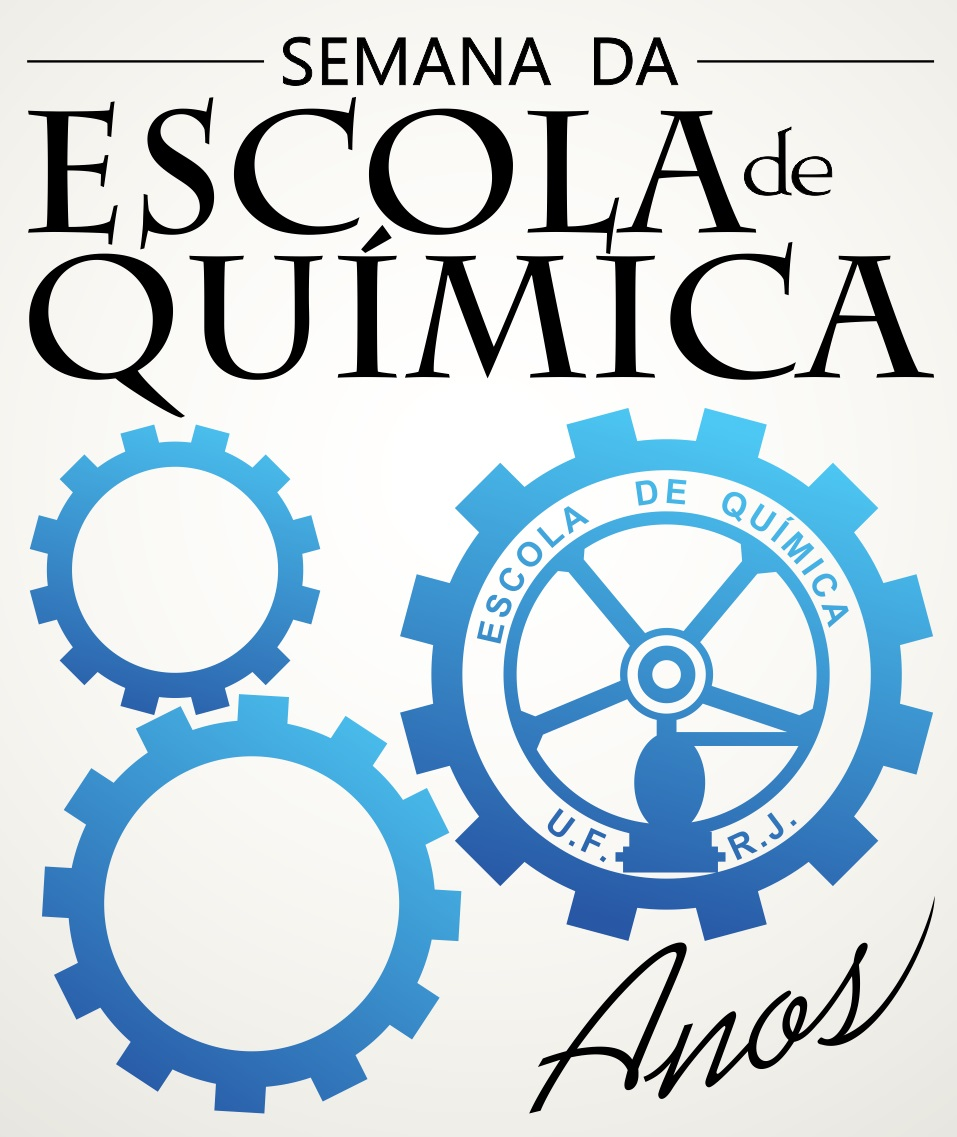 Logo comemorativa da SEQ 80